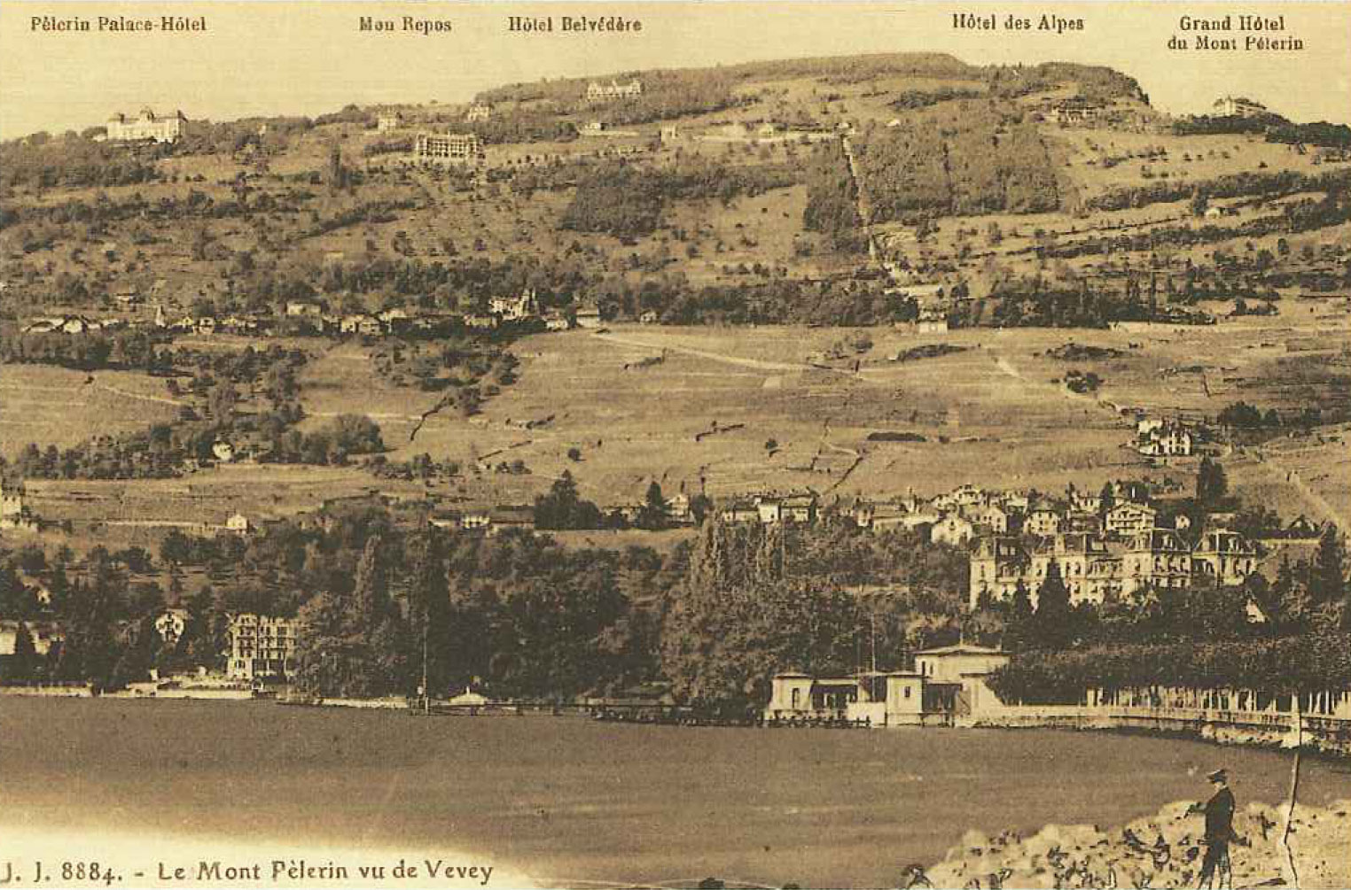 Prise de vue depuis l'embouchure de la Veveyse à Vevey en direction de Corseaux, Chardonne et du Mont-Pèlerin, canton de Vaud, Suisse. Pour comparer, voir cette photographie datant du début du XXIème siècle. Au premier plan au bord du lac Léman: les bains de Vevey (détruit fin des années huitante, début des années nonante, actuel centre de l'aviron et solarium), le Grand Hôtel (détruit en 1956, emplacement actuel du siège international de Nestlé), un port (détruit lors de la construction du siège de Nestlé). Au second plan: tout à droite la ligne du Funiculaire Vevey – Chardonne – Mont Pèlerin, le village de Corseaux au-dessus du Grand Hôtel, les vignobles de Lavaux, le village de Chardonne au-dessus à gauche, le Mont-Pèlerin (commune de Chardonne) et ces grands hôtels; Le Pèlerin Palace-Hôtel (le bâtiment existe encore mais n'est plus un hôtel), Mon Repos (actuel Hôtel Le Mirador Kempinski), l'Hôtel Belvédère (détruit à la fin des années quarante), l'Hôtel des Alpes (détruit dans les années cinquante) et le Grand Hôtel du Mont Pèlerin (actuel établissement médico-social de La Maison du Pèlerin, construit en 1902, acquit en 1953 par l'Association de La Maison du Pèlerin).